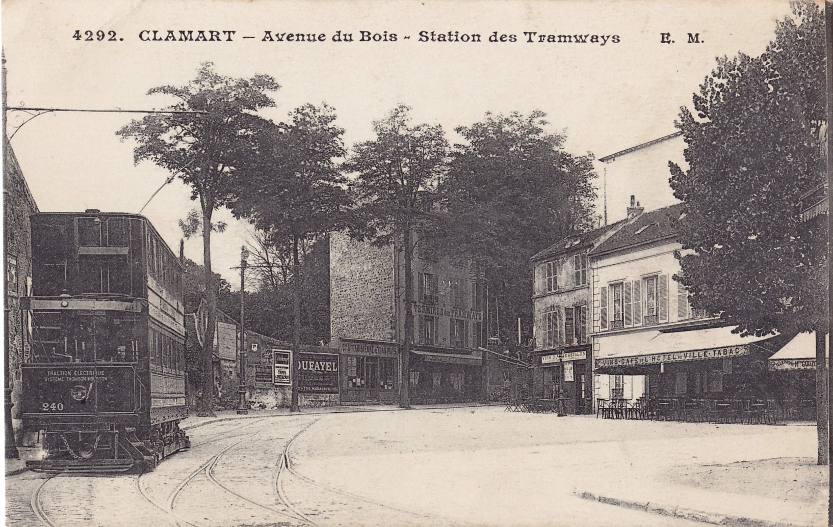 Carte postale ancienne éditée par EM, n°4292 : CLAMART - Avenue du Bois - Station des Tramways